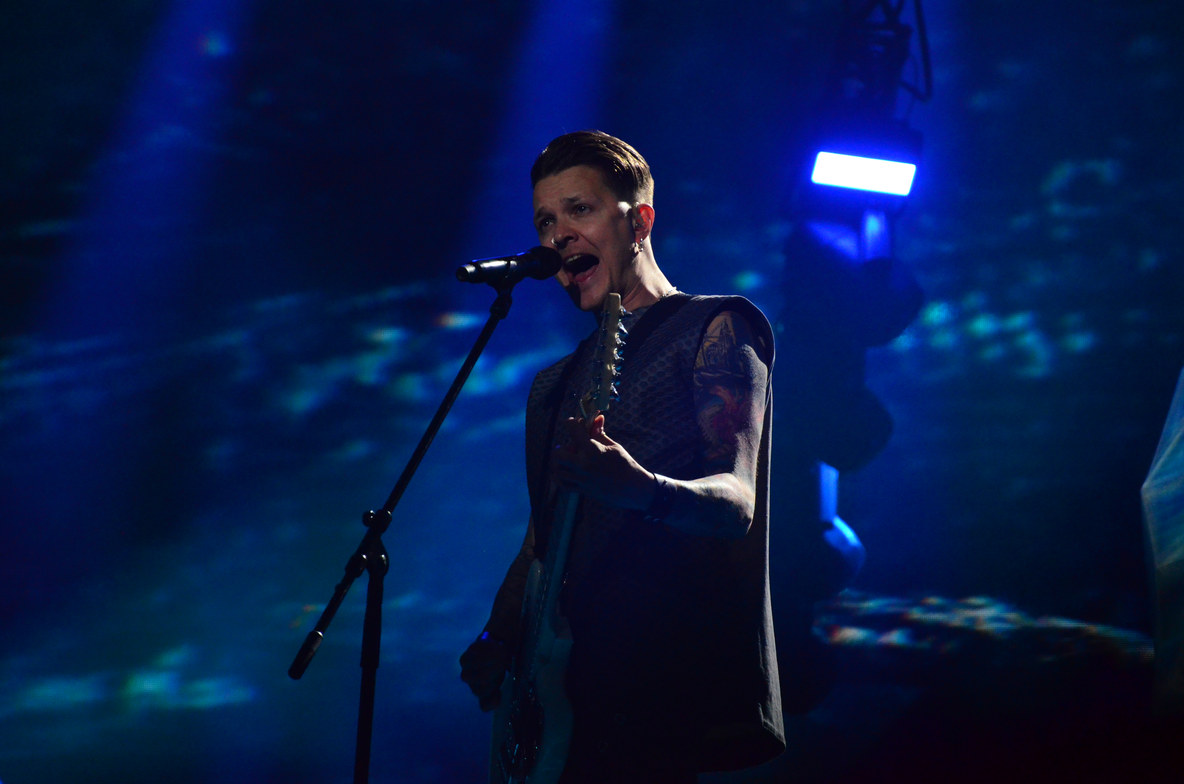 12 травня. Генеральна репетиція фіналу Євробачення 2017.O. Torvald.